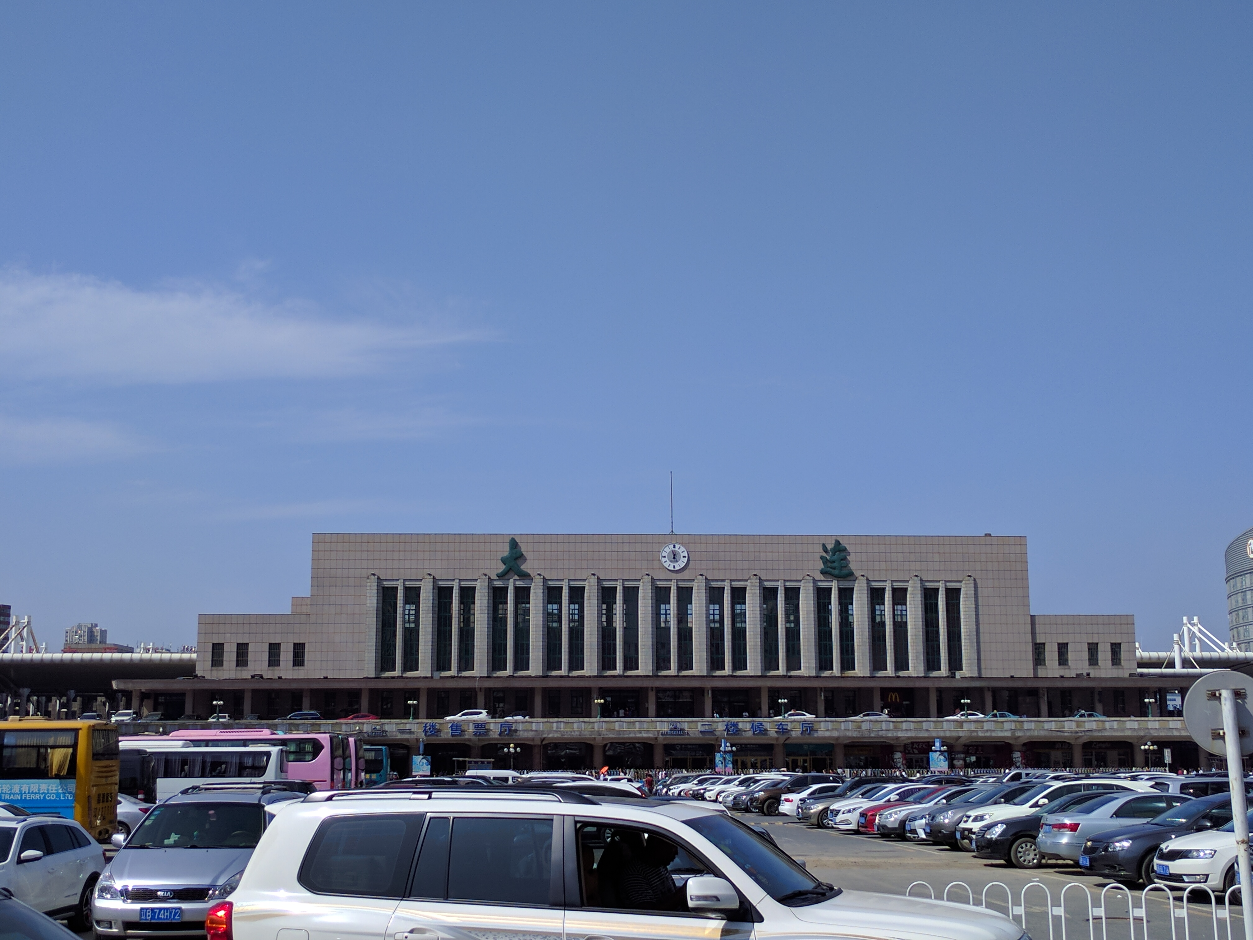 中文（中国大陆）: 大连火车站